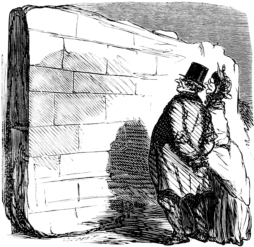 Mur mitoyen plaidé par Démosthènes.